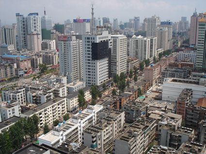 Kunming skyline